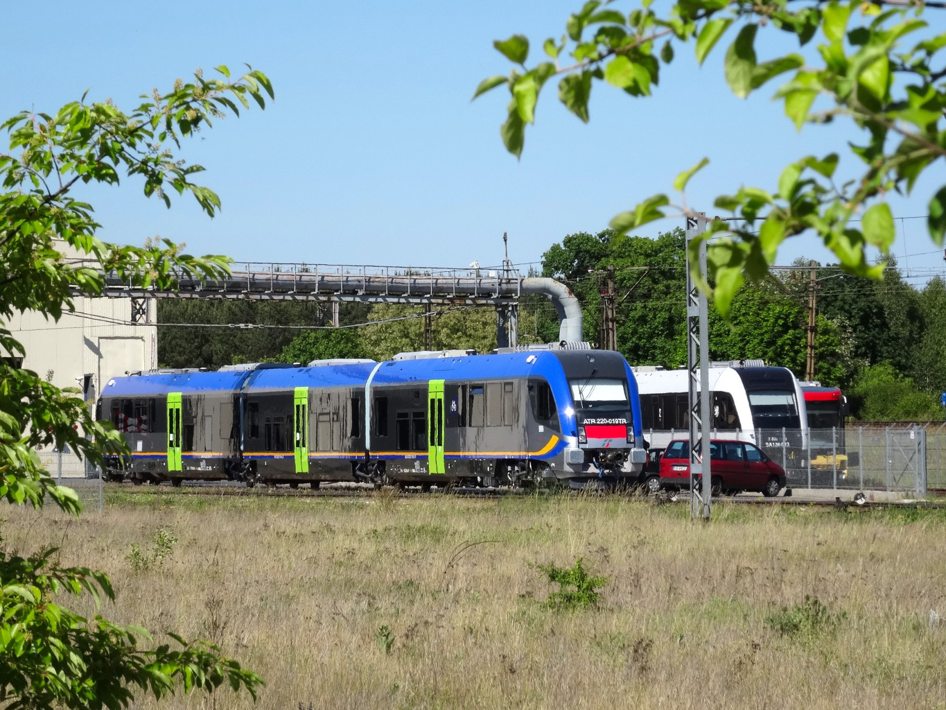 Pojazdy Szynowe PESA Bydgoszcz S.A., autobusy szynowe przy ul. Ludwikowo